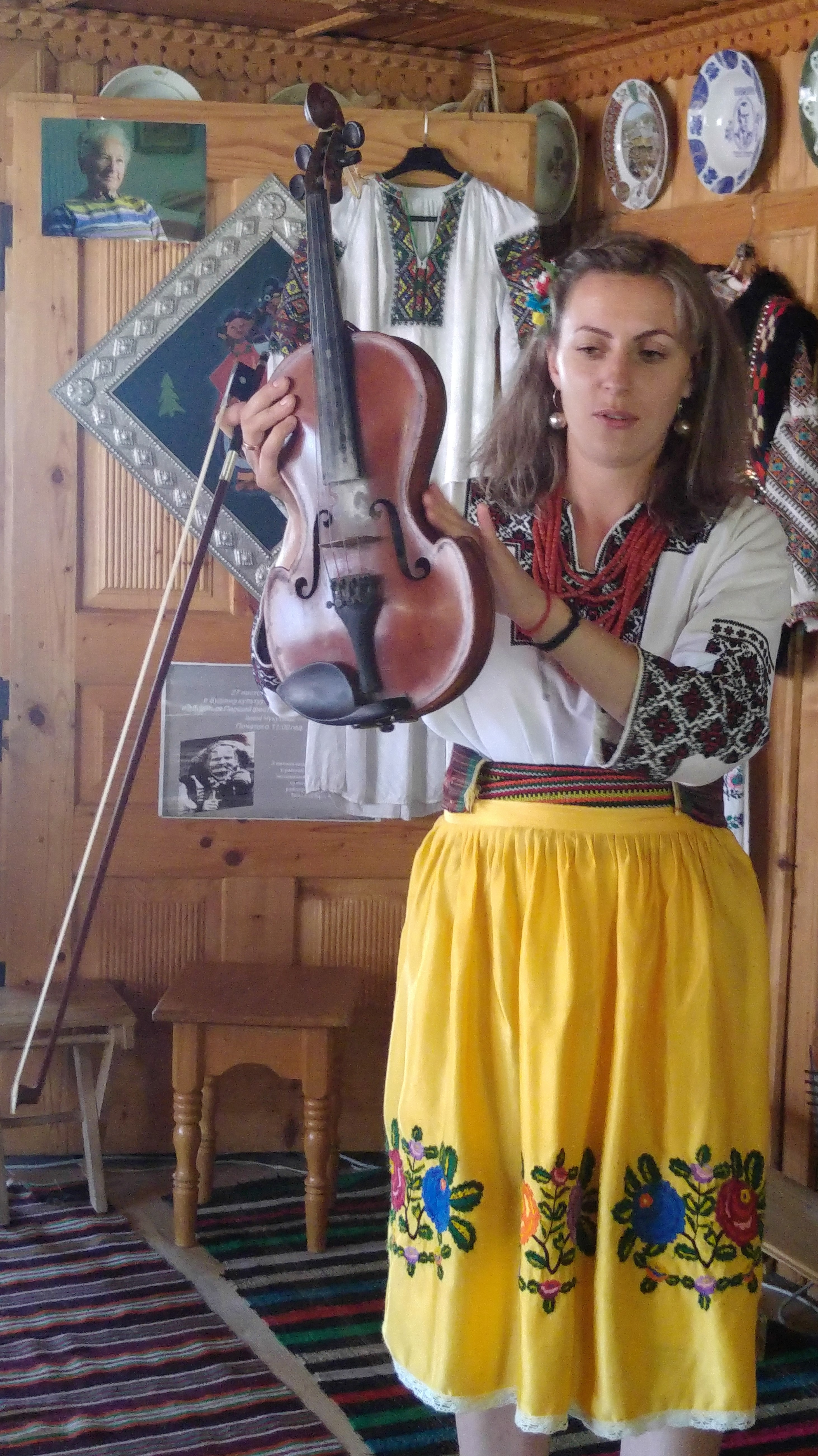 Skrzypce huculskie - pokaz instrumentów w Muzeum Romana Kumłyka w Werchowynie (d.pol.Żabie) - Ukraina. Prezentuje Natalia - córka zmarłego w 2014 znanego muzykanta.